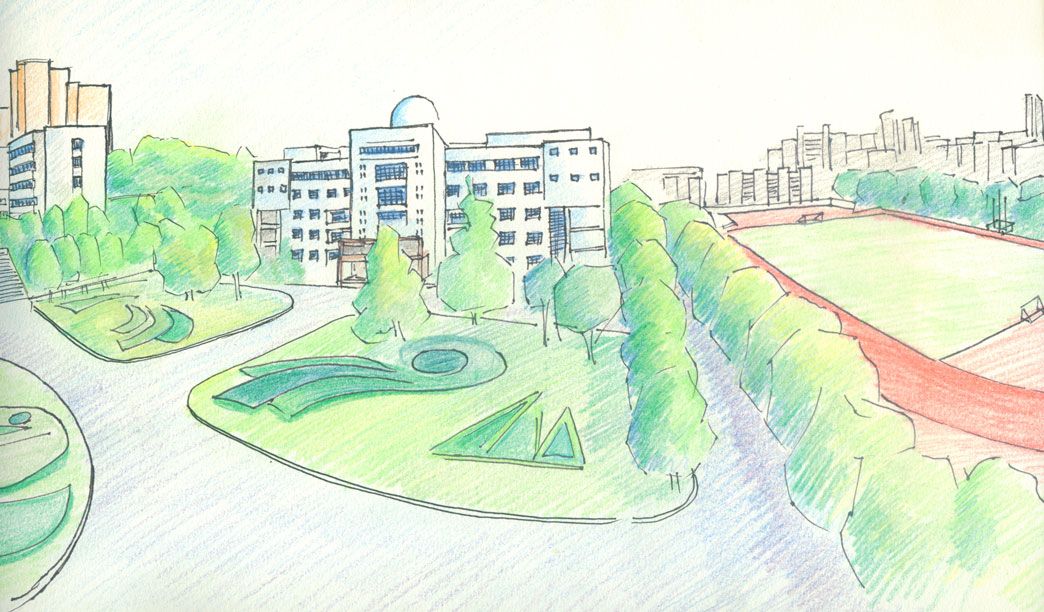 本人（lixihan）的手绘作品。